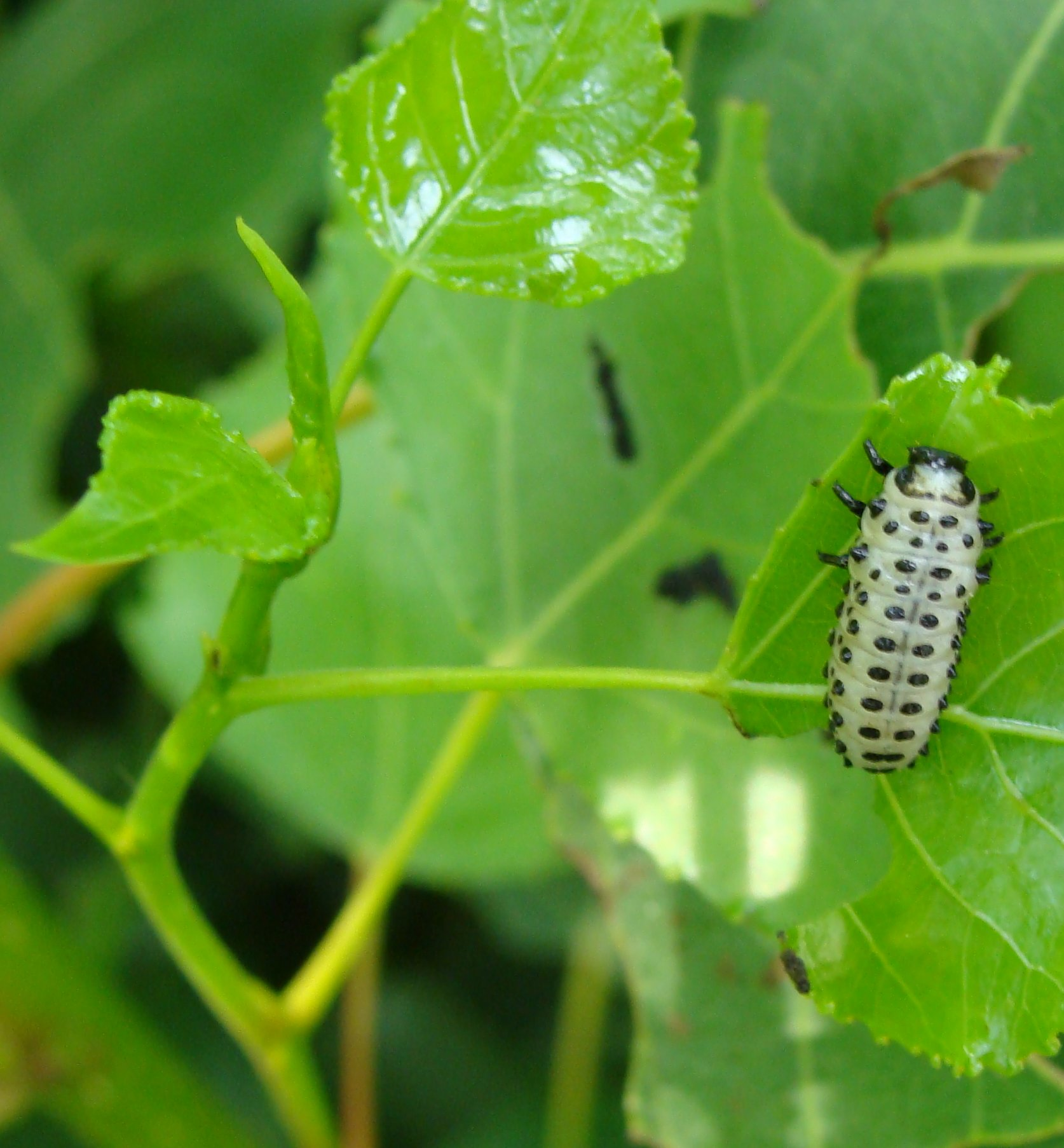 Larwa rynnicy topolowej (Melasoma populi L.)